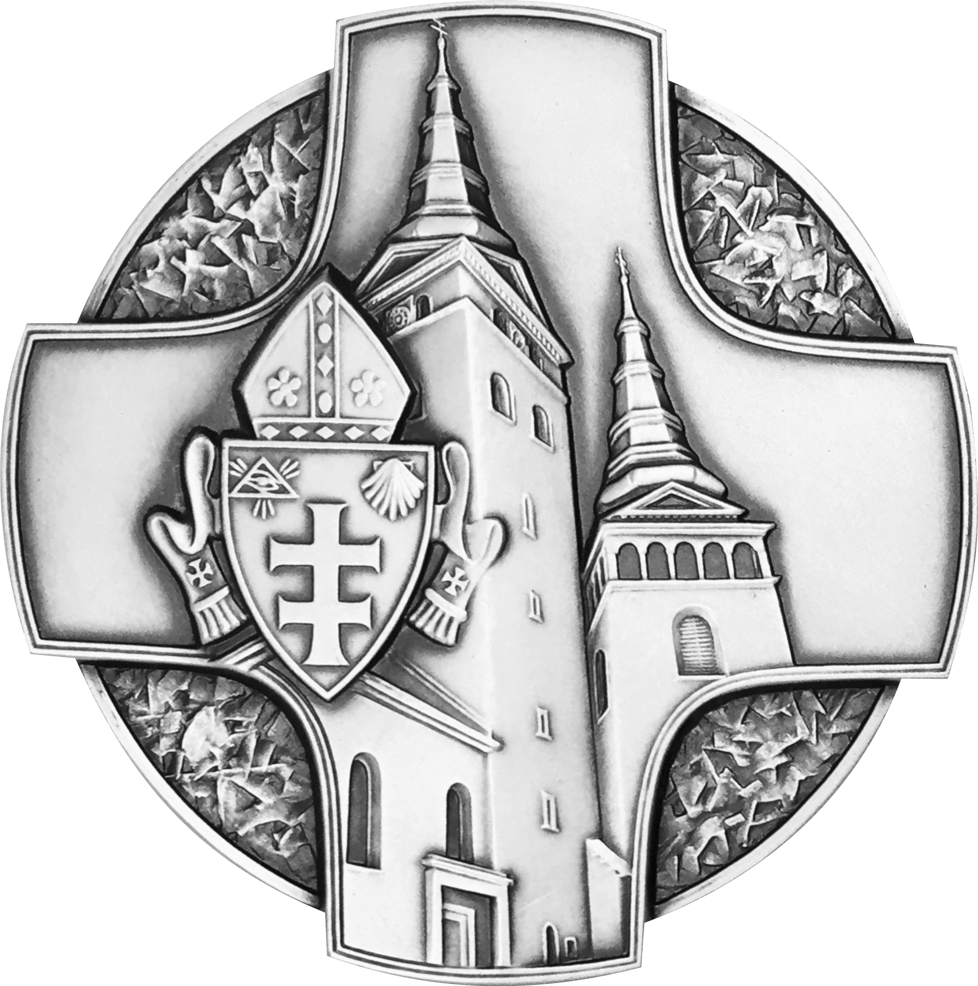 Vyznamenanie Žilinskej diecézy